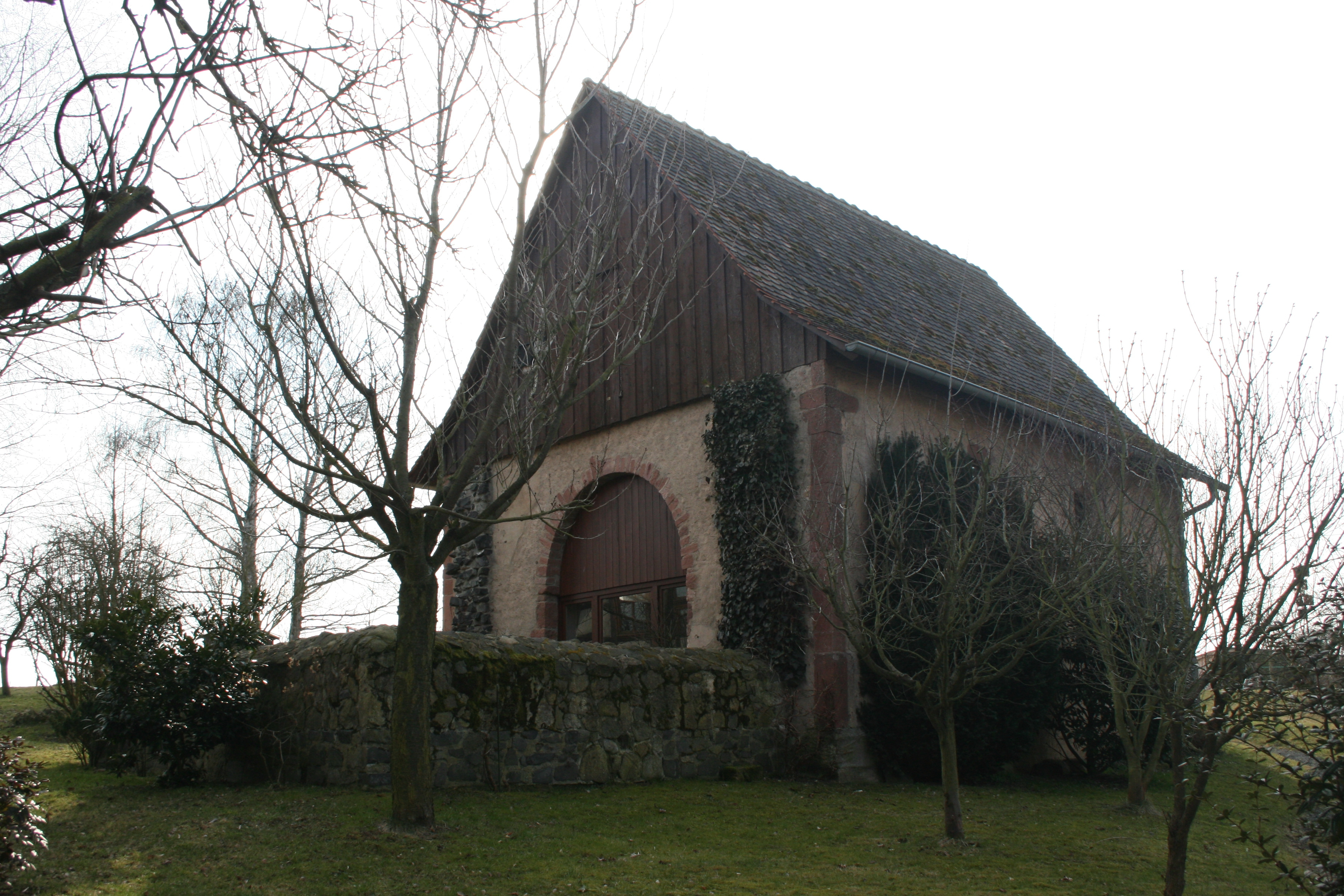 Hirzbacher Kapelle, östliche Stirnseite mit abgebrochenem Chor.